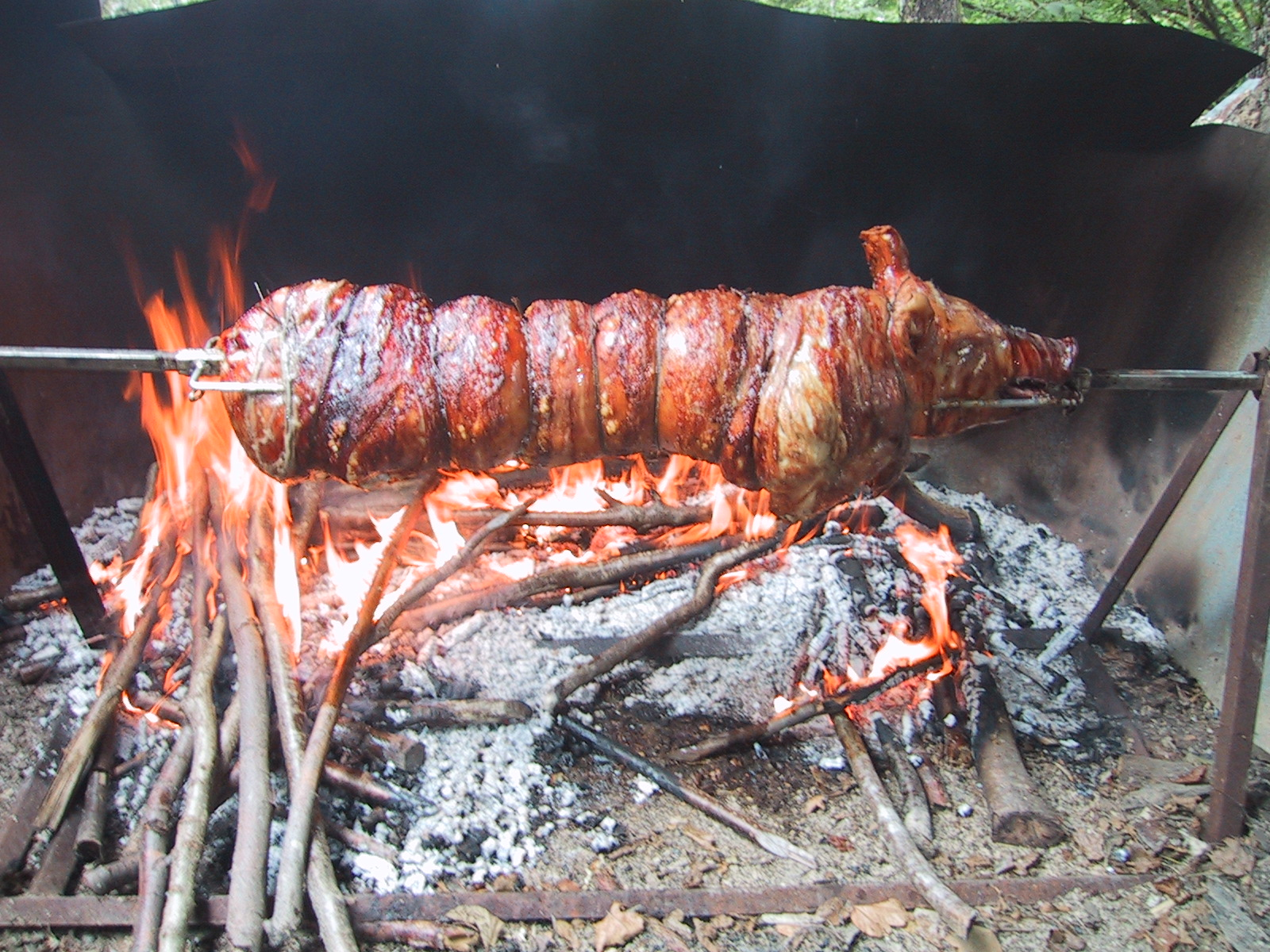 Storia della porchetta di fine estate. L'Alpe S. Antonio è una sorta di alpeggio: le case di chi (pochi, oramai) ci vive, sono lontane le une dalle altre. Anche dei kilometri. E' un mondo a parte, dove ancora sopravvivono antiche tradizioni e un'incredibile etica sociale. Non tutto è misurato a denari, ma certe cose - dalla notte dei tempi - si fanno per collaborazione nell'affrontare le difficoltà del lavoro nei campi, nel bosco e con gli animali (meno ancora dei cristiani rimasti...). Tra queste ci sono il taglio del fieno, la raccolta delle castagne, rifare un tetto. Festeggiare insieme. Una delle tradizioni più recenti (anche se si sposta nel corso dei dodici mesi, ma è sempre la stessa. Una volta era per Pasquetta alias lunedì dell'Angelo) è quella del pranzo di fine estate (in realtà a fine agosto) con la porchetta gentilmente offerta dal Tiziano e cucinata dallo Stefano. Già alle 7 del mattino, in genere sotto la tettoia dove si ripone la legna per l'inverno, c'è il ritrovo di anziani, giovani e bimbetti con la porchetta che inizia a girare sullo spiedone (genialmente motorizzato da un motore ex-lavatrice e cambio di vespetta con cinghia di camion). Si va avanti fino alle una o anche più tardi con vari fiaschi e bottiglie di vino, salami, pancette, golette (alias guanciale), formaggi morbidi e stagionati. Pane cotto nel forno di casa (che non si fa quasi più se non in queste rare occasioni). Tutto rigorosamente di produzione familiare. E' una giornata un pò come la festa di o-bon in Giappone: si ride, si scherza e si ricorda, con il sorriso sulle labbra, quelli (sono sempre di più) che hanno lasciato i prati dell'Alpe per altri monti celesti. E' uno dei giorni che abbandono la mia dieta. Of course (di corsa). Pochi son quelli che restano sobri. Si sprecano racconti, scherzi e prese in giro. Arrivederci al 2006!!!